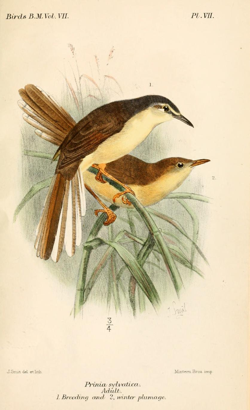 Prinia sylvatica, Jungle Prinia